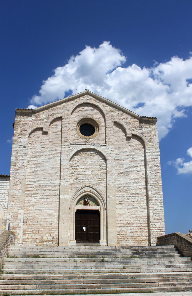 Chiesa di San Francesco, 1245